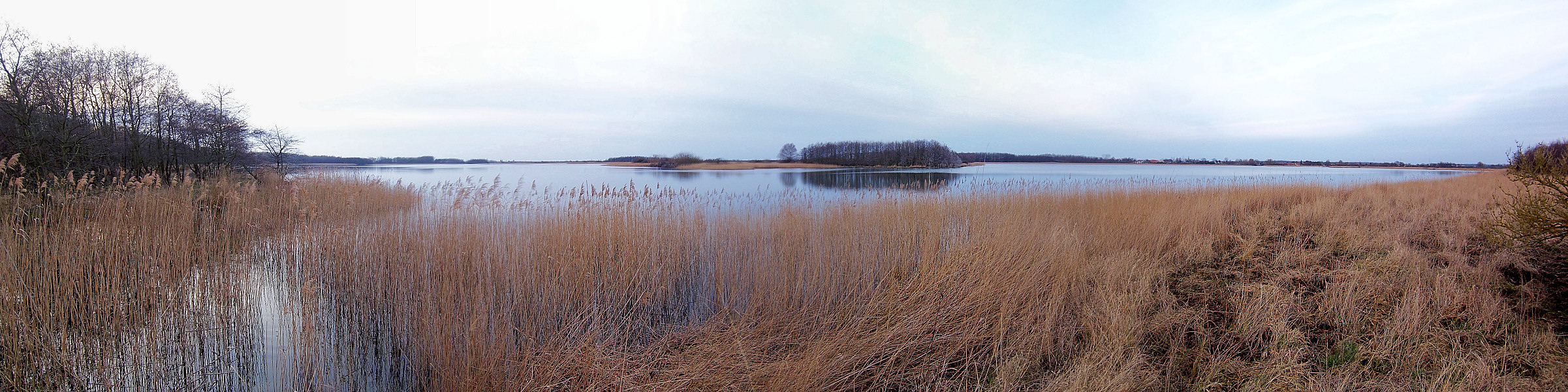 Conventer See vom Westufer